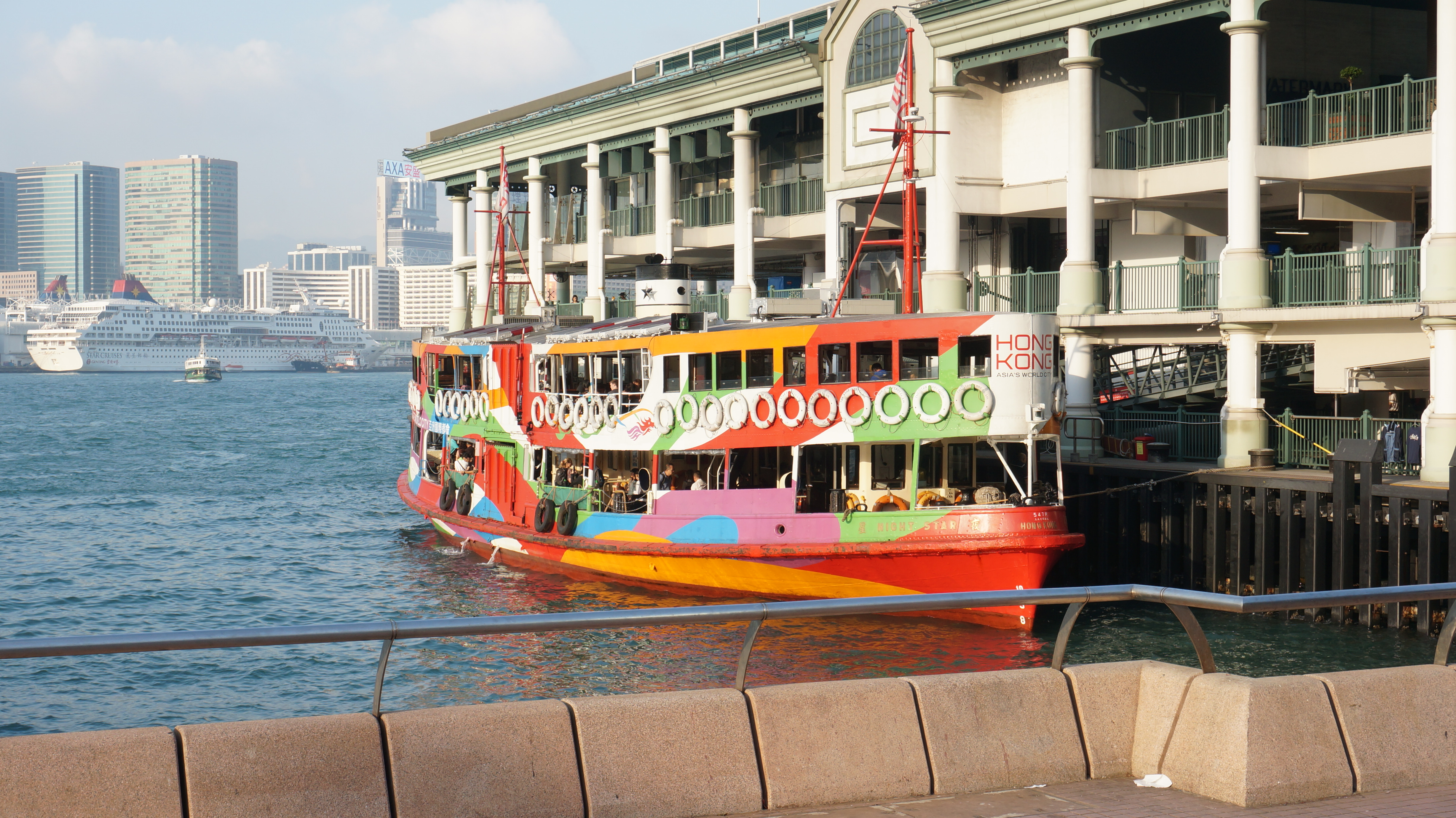 天星小輪「夜星」號正停泊於中環天星碼頭